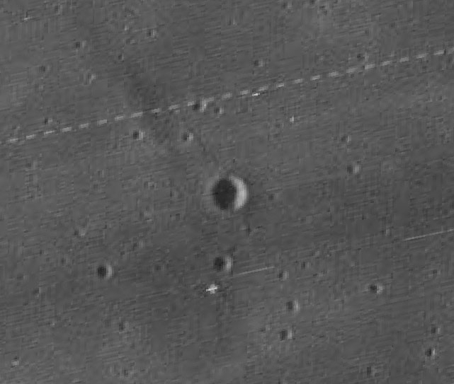 Cráter Eckert (Mare Crisium).